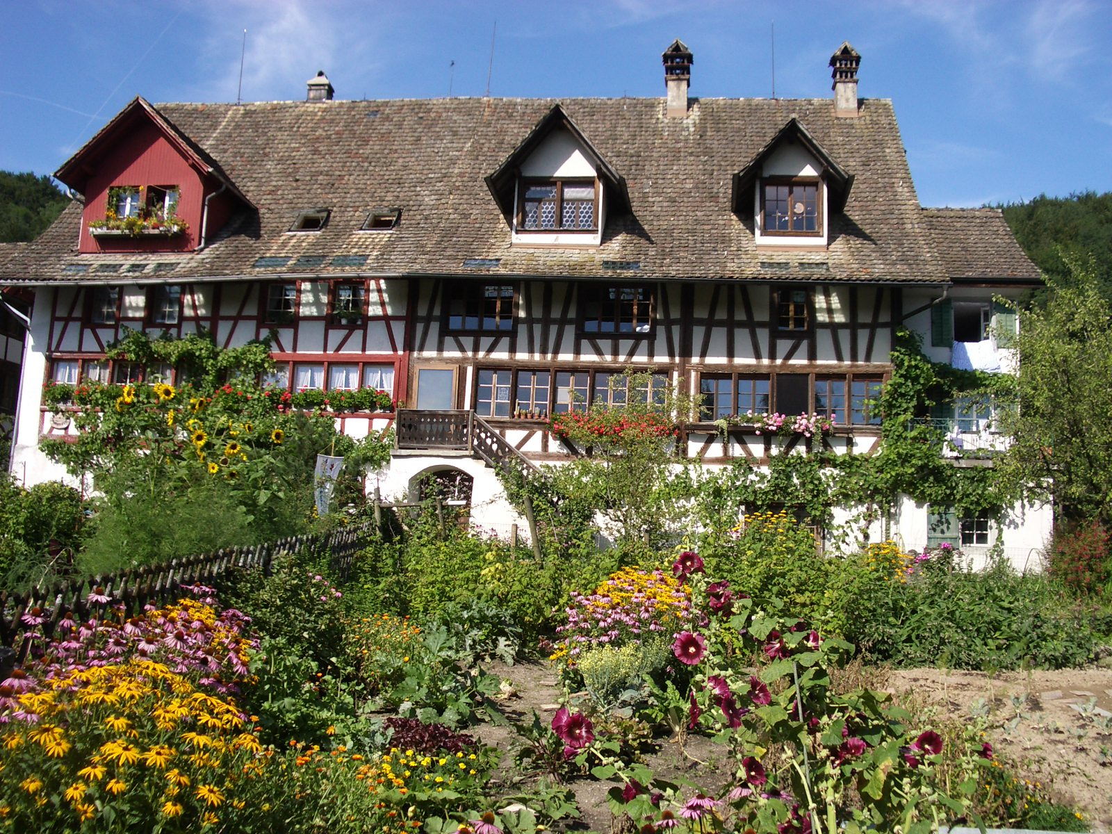 Husertal ZH, Switzerland